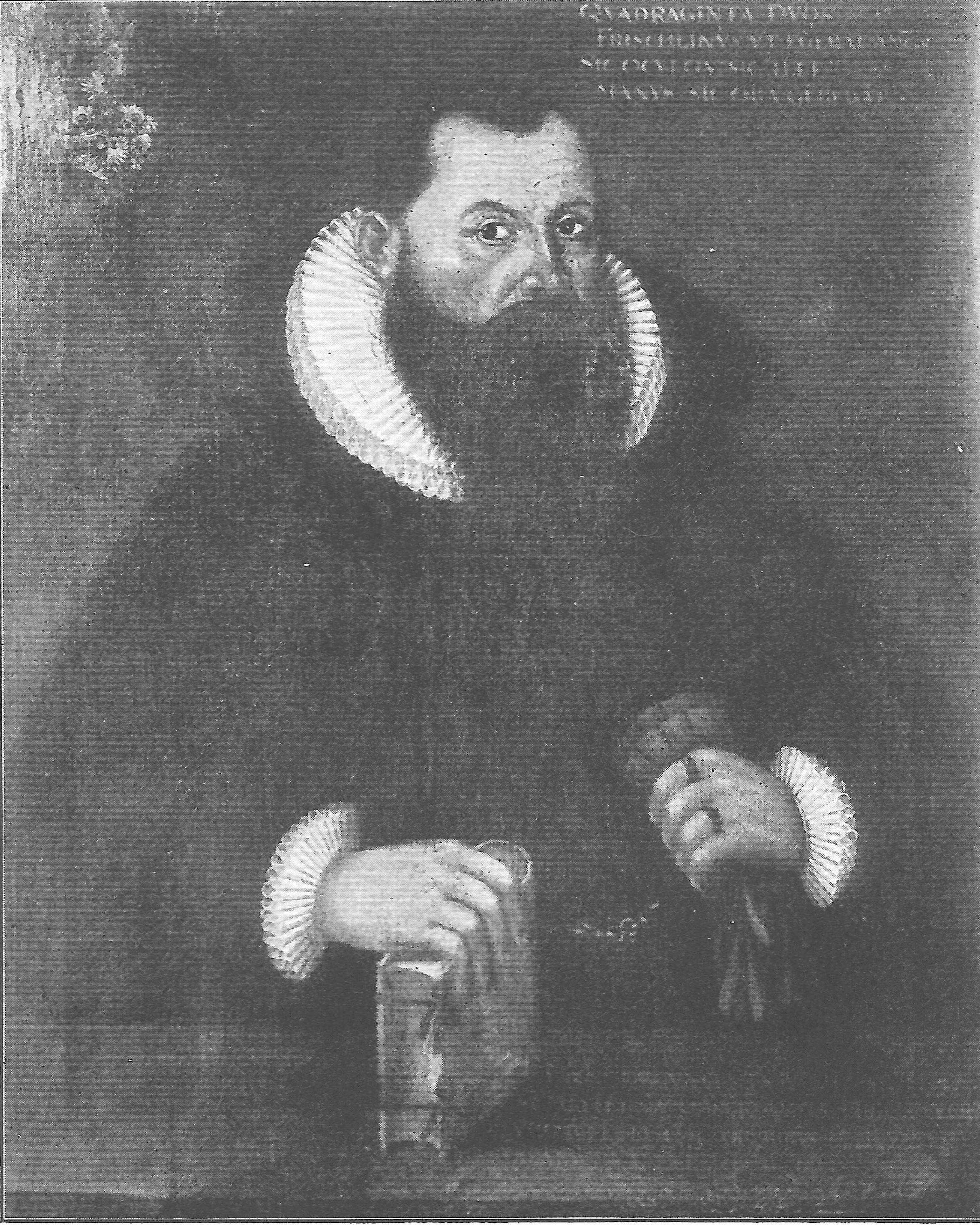 Bild in der Tübinger Professorengalerie